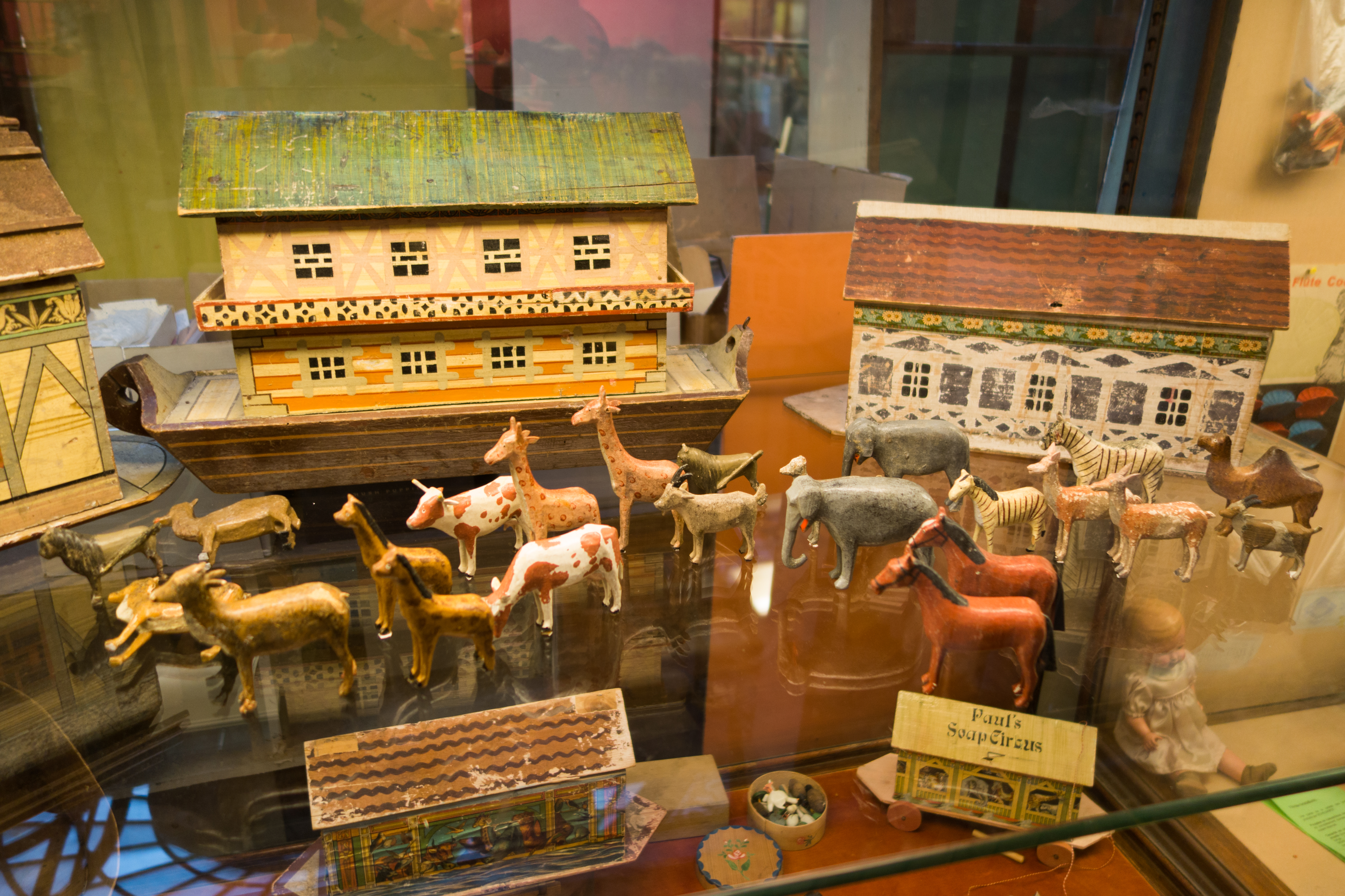 Le Musée du Jouet de Bruxelles